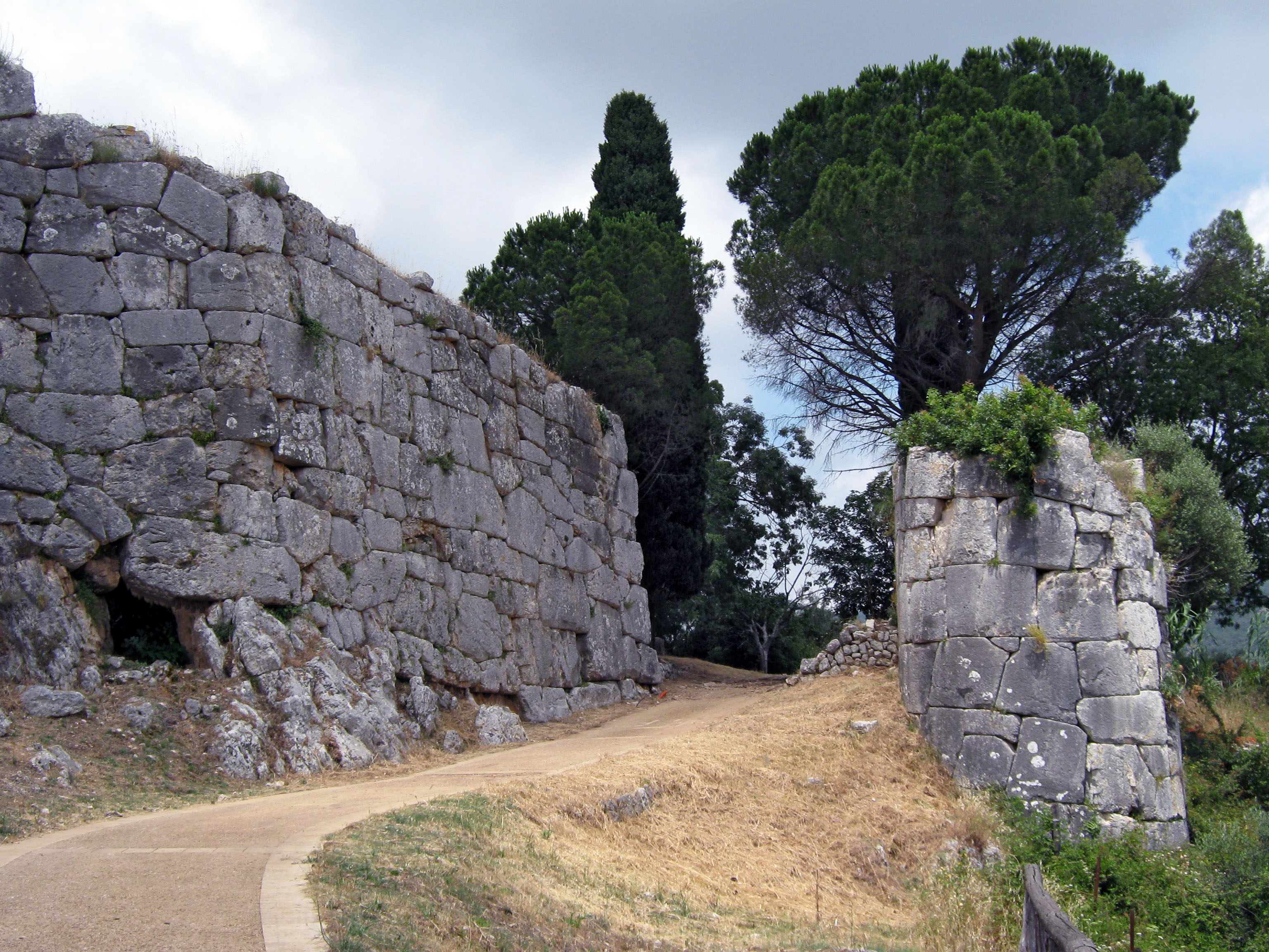 Hauptzugang zu den Ruinen von Norba, Mauer mit Zyklopensteinen